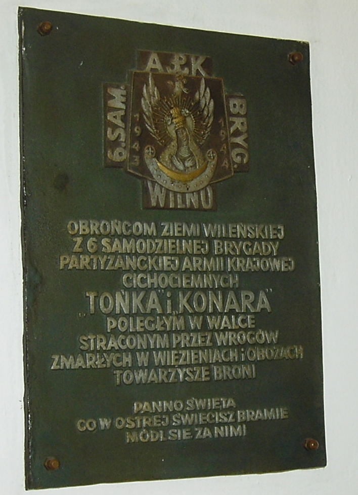 Tablica poświęcona 6 Wileńskiej Brygadzie Armii Krajowej w Kościele pw. Matki Boskiej Ostrobramskiej w Szczecinie